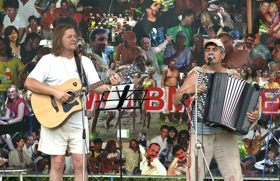 Грушинский фестиваль, Самарская область, Россия